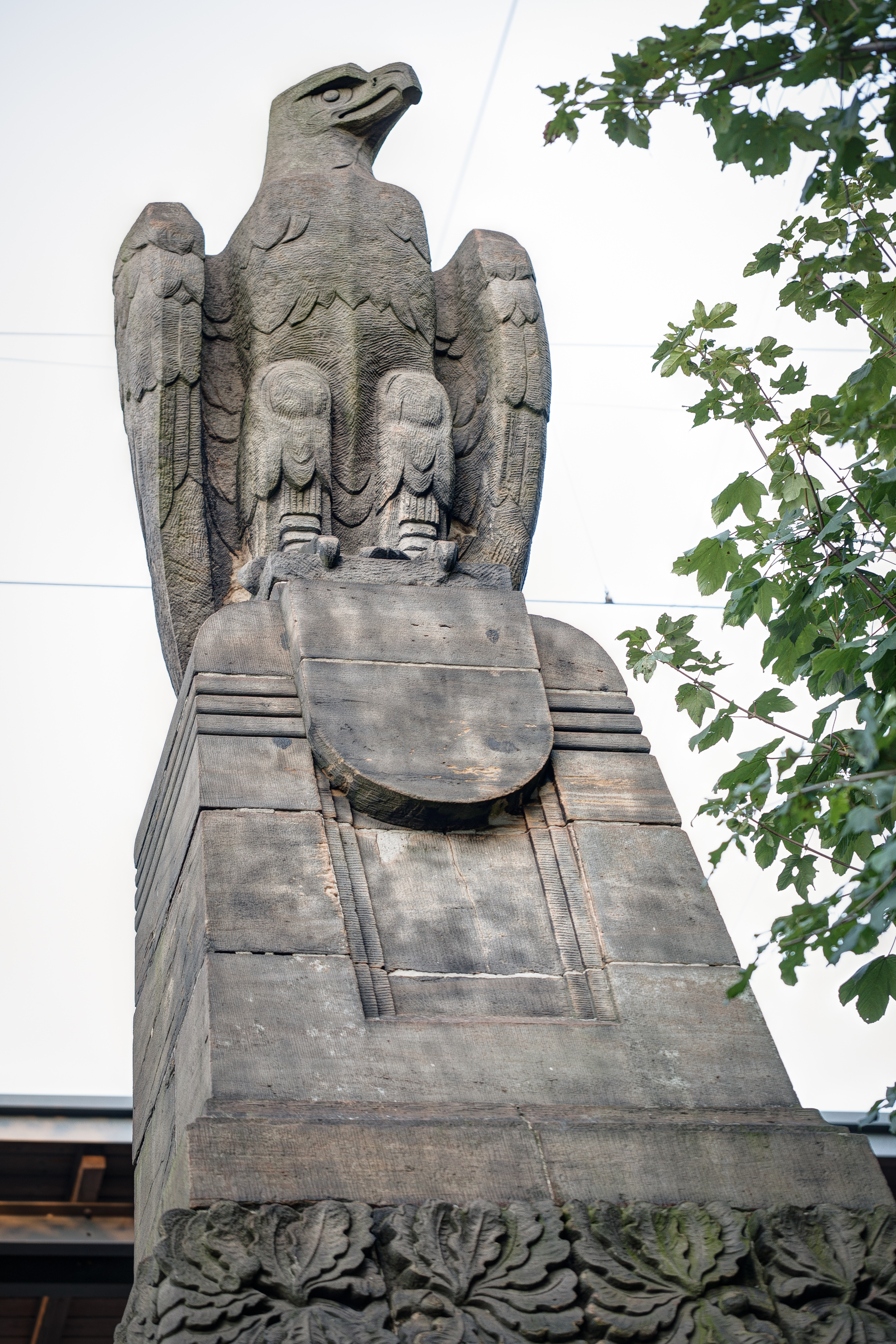 Eisenbahnbrücke am Bismarckbahnhof, Mainzer Straße, Südstadt Hannover. Südlicher Brückenkopf auf der Westseite.